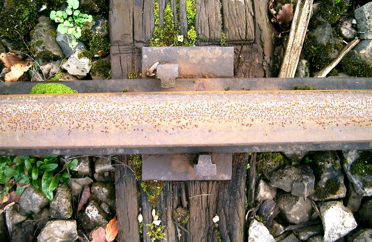 Schinnefixatioun mat Neel; Source: Eege Foto vum User:Pecalux; Datum: 03.11.2006